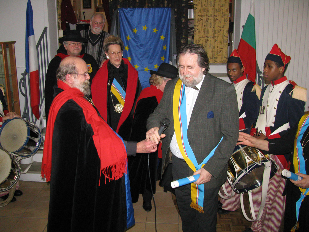 През 2009 г. К. Кадийски беше избран за почетен гражданин на “Монмартърската република”. Момент от тържеството по тоя повод.